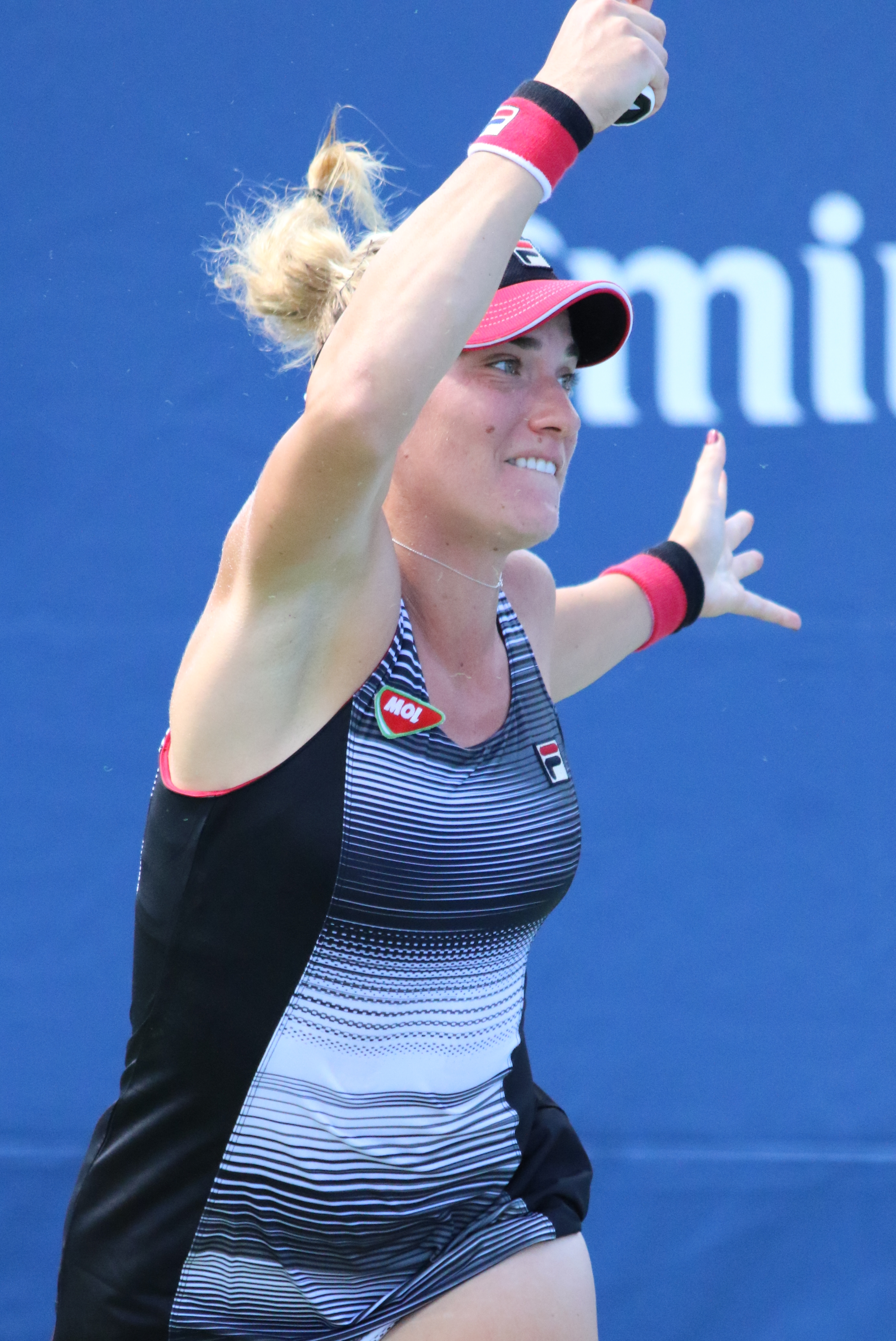 Babos US16 (4)